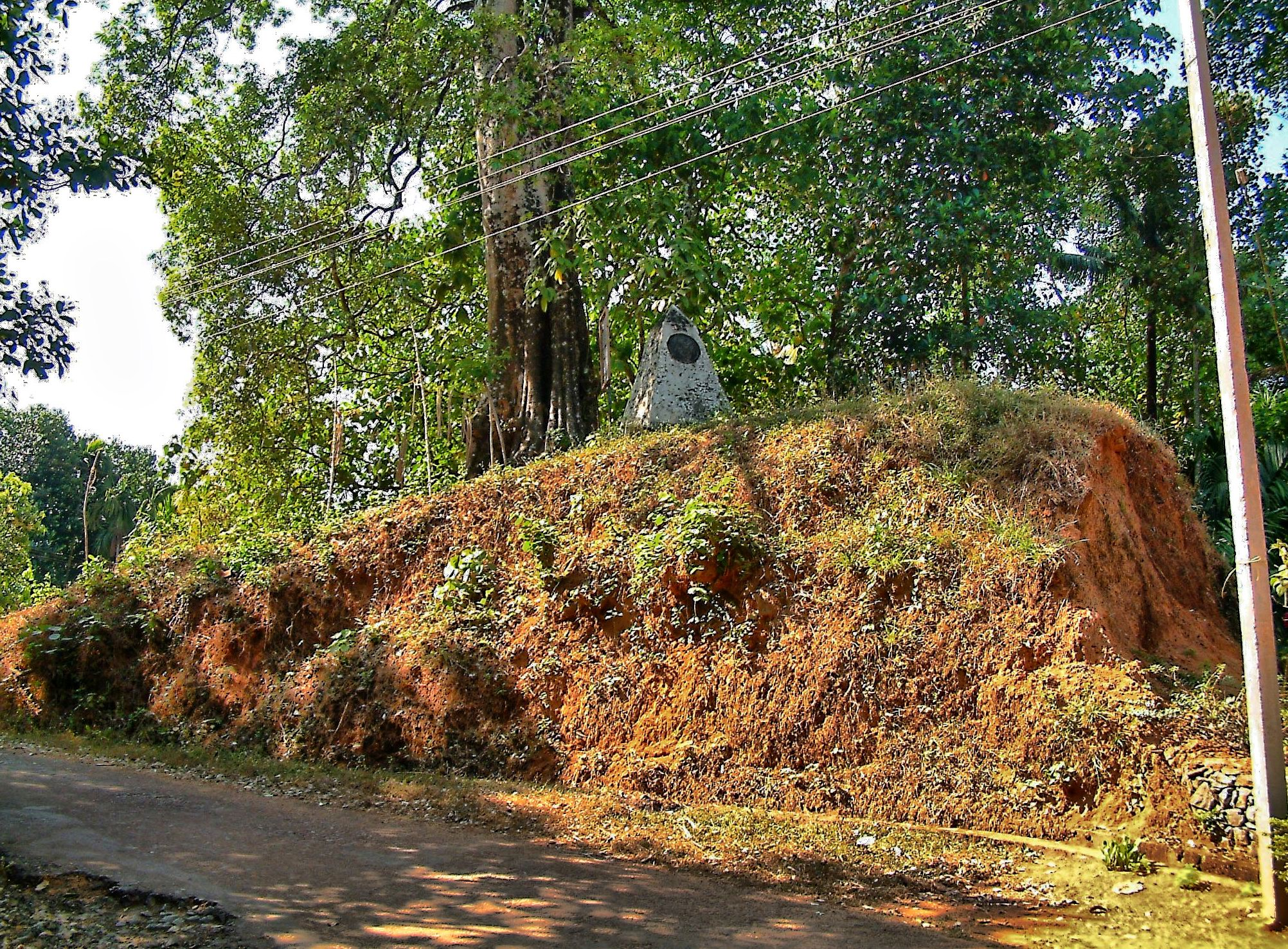 The entrance of travancore lines. relics.